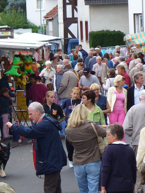 Bild vom Wenkbächer Dorfmarkt. Personality rights warning Although this work is freely licensed or in the public domain, the person(s) shown may have rights that legally restrict certain re-uses unless those depicted consent to such uses. In these cases, a model release or other evidence of consent could protect you from infringement claims.